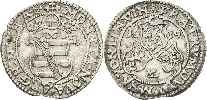 Kipper-Dreibätzner 1619, Müntstätte Weimar